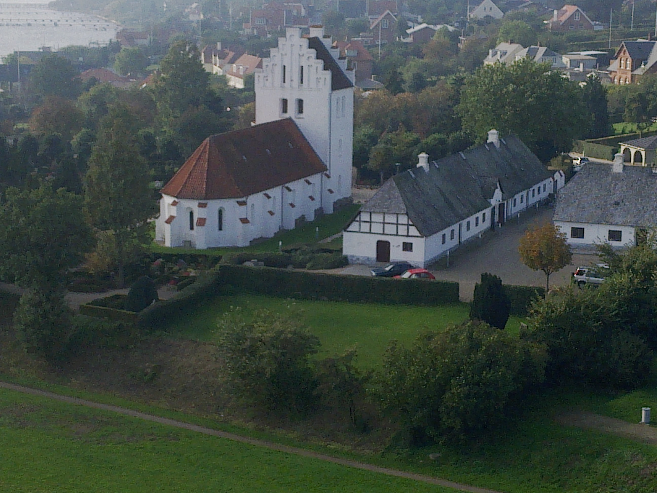 Sankt Jørgens Kirke, Svendborg, Danmark